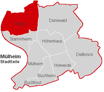 Lagekarte Flttard im Stadtbezirk Köln-Mülheim